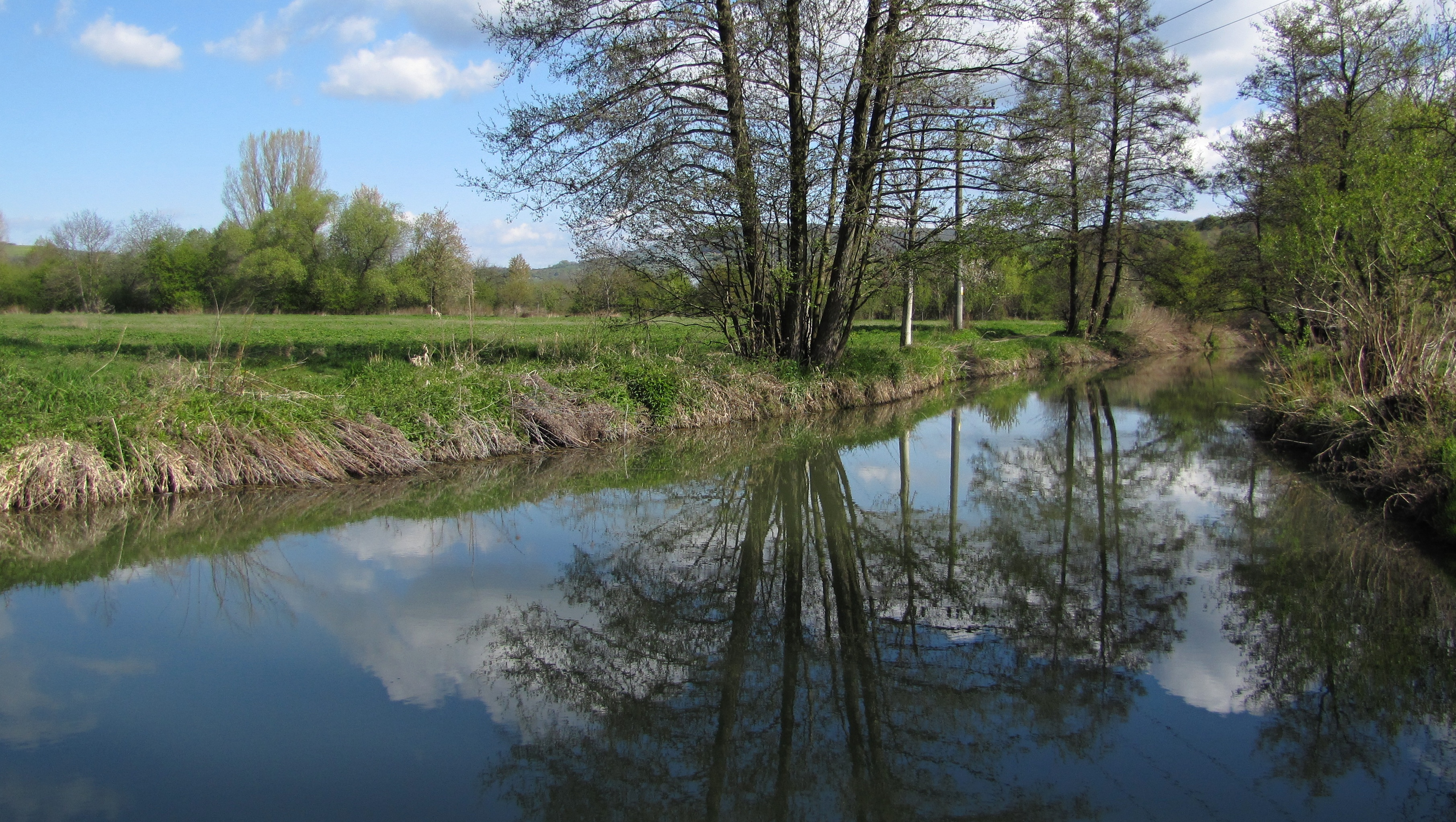 Řeka Kyjovka nad boršovským splavem v Kyjově Boršově